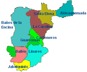 Mapa de Municipios de la comarca de Sierra Morena